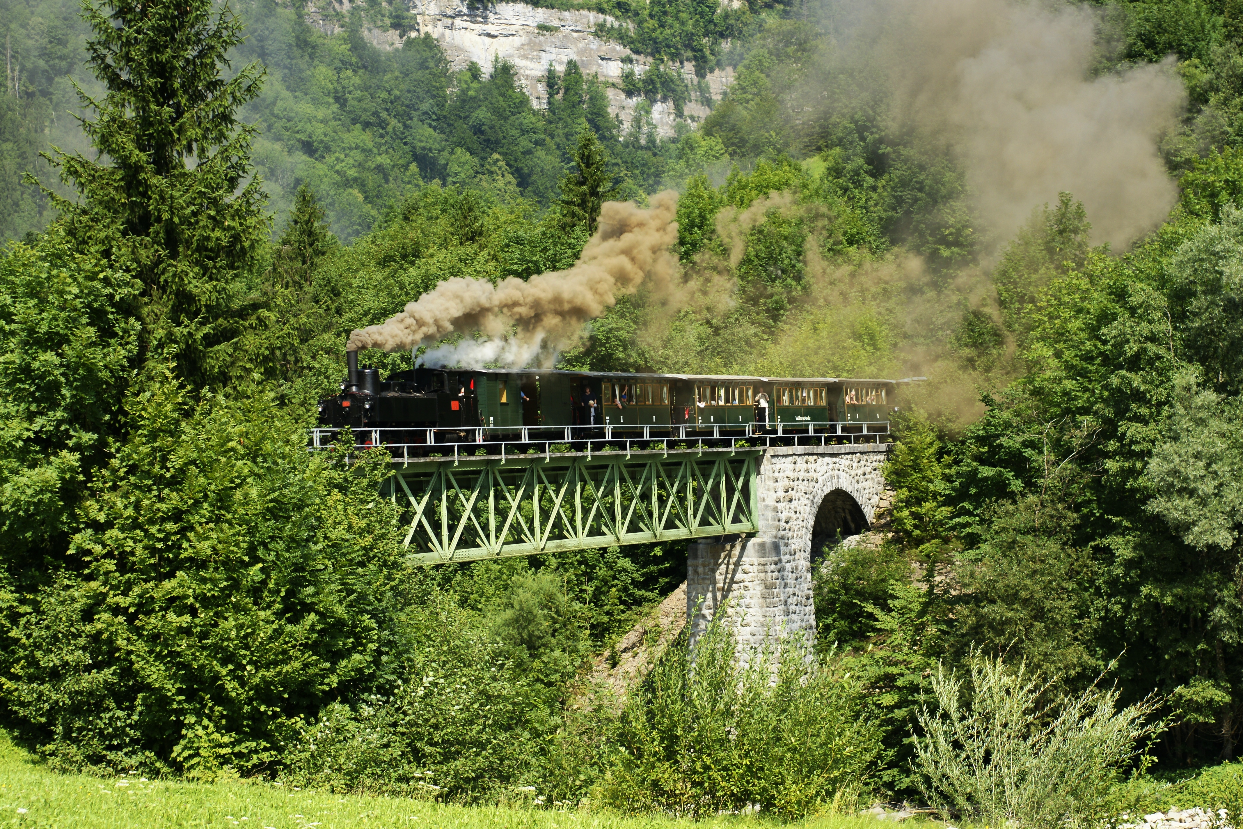 Museumsbahn "Wälderbähnle" auf Sporeneggbrücke bei Schwarzenberg in Vorarlberg.